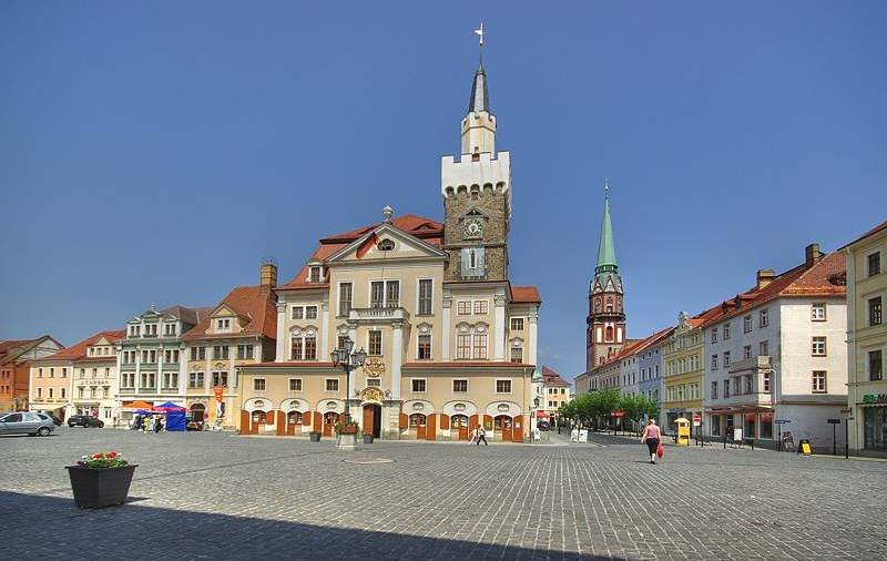 Löbau, Altmarkt und Nicolaistraße